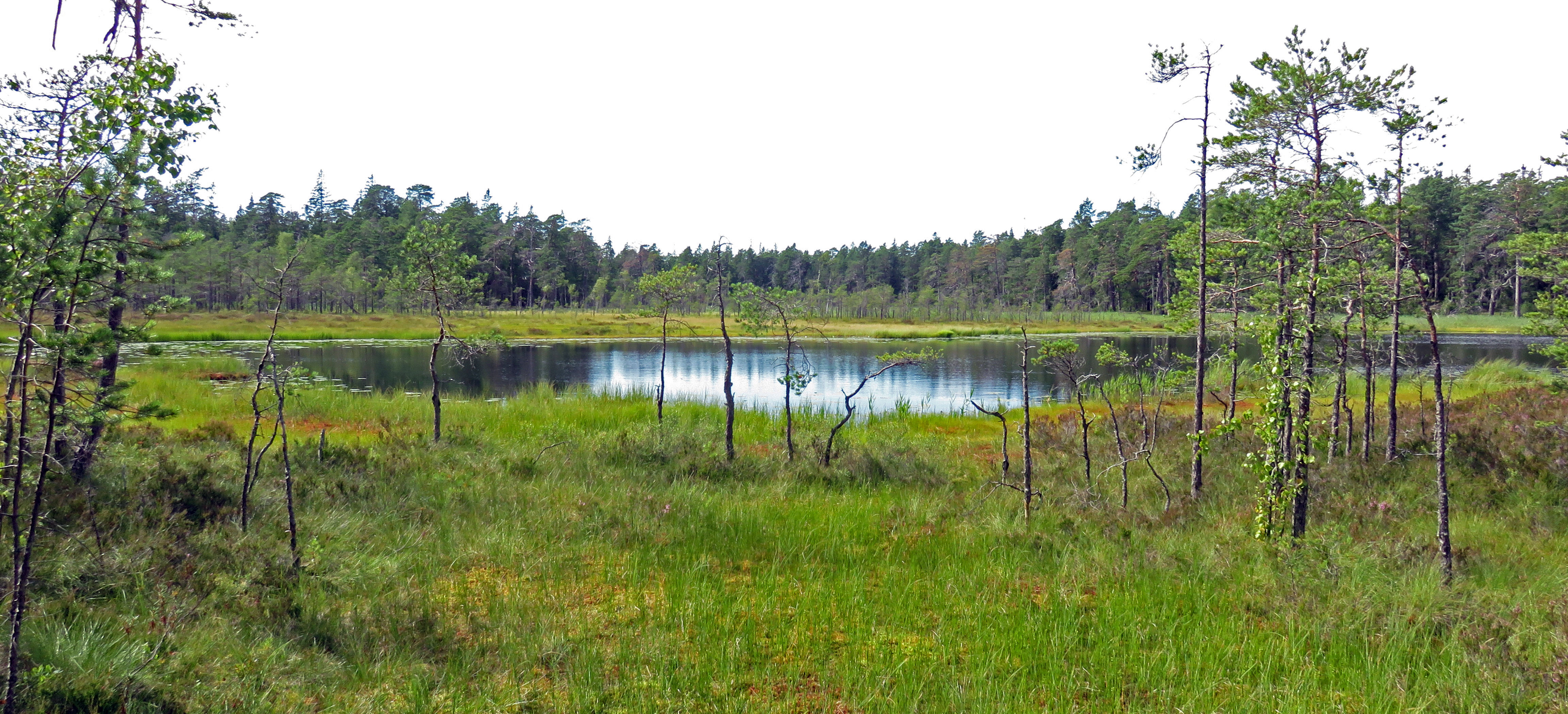 Årsjötjärn